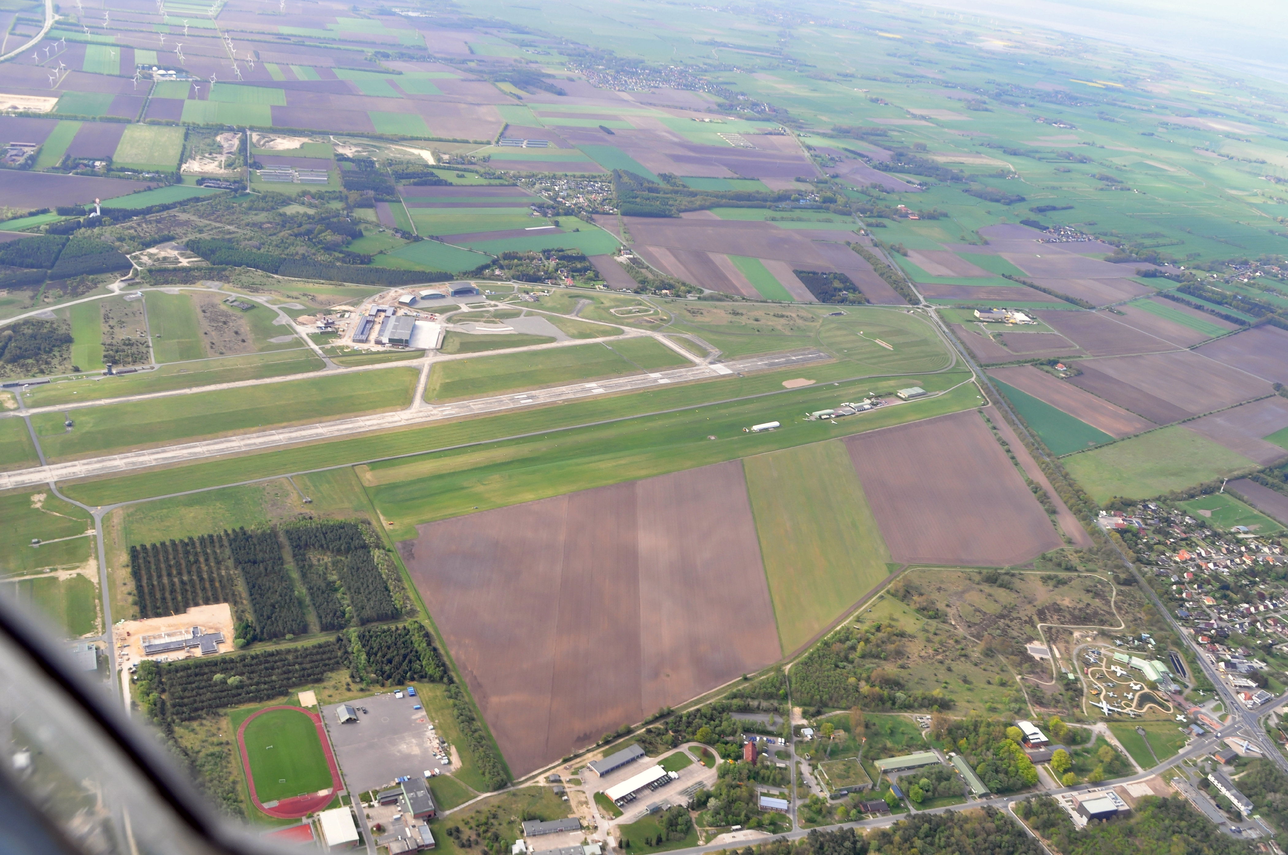 Luftbilder von der Nordseeküste 2012-05: Nordholz mit Aeronauticum, Flugplatz Nordholz-Spieka und Fliegerhorst Nordholz